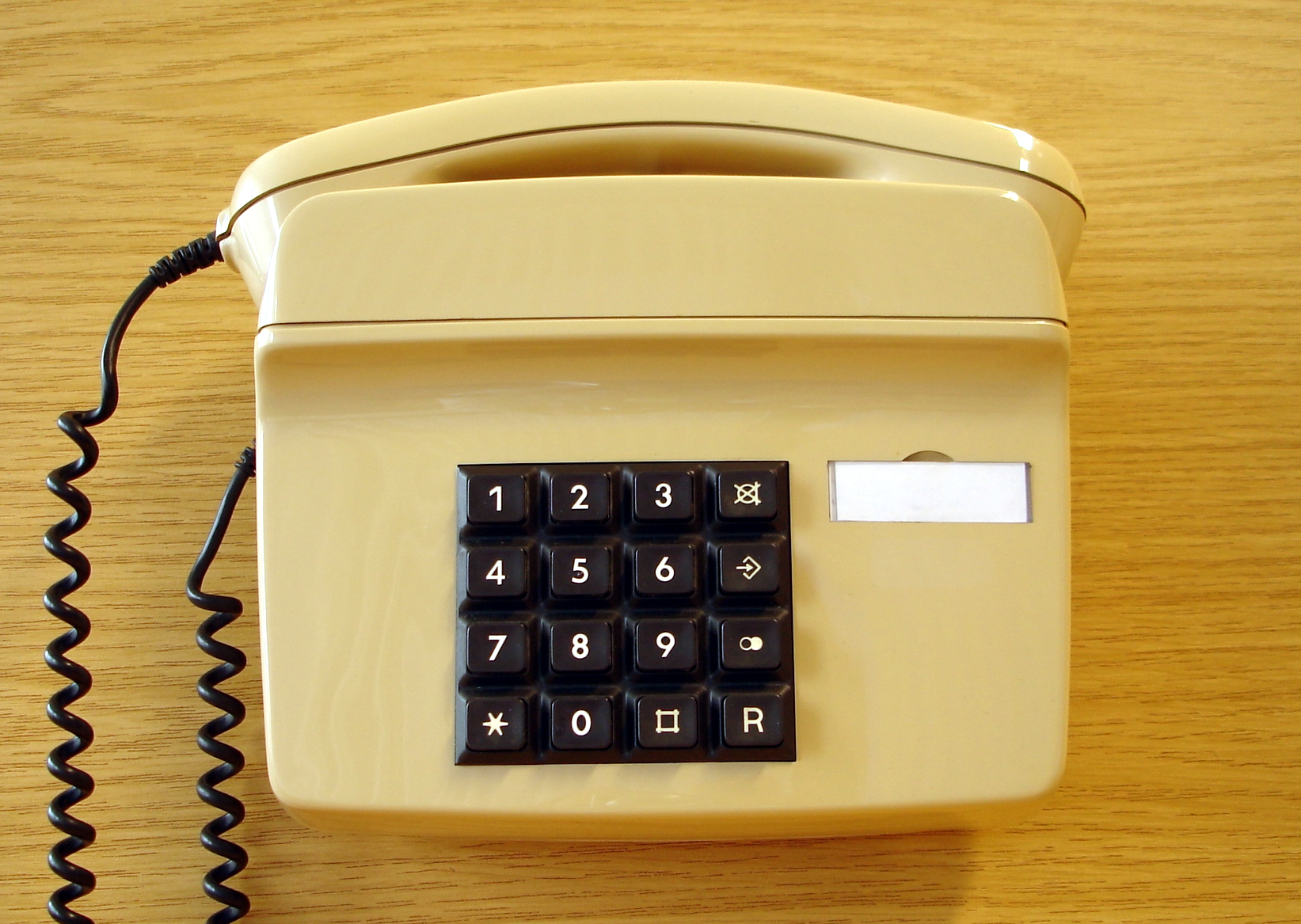 WandTelefon WTel 01 LX, Datum 09.89